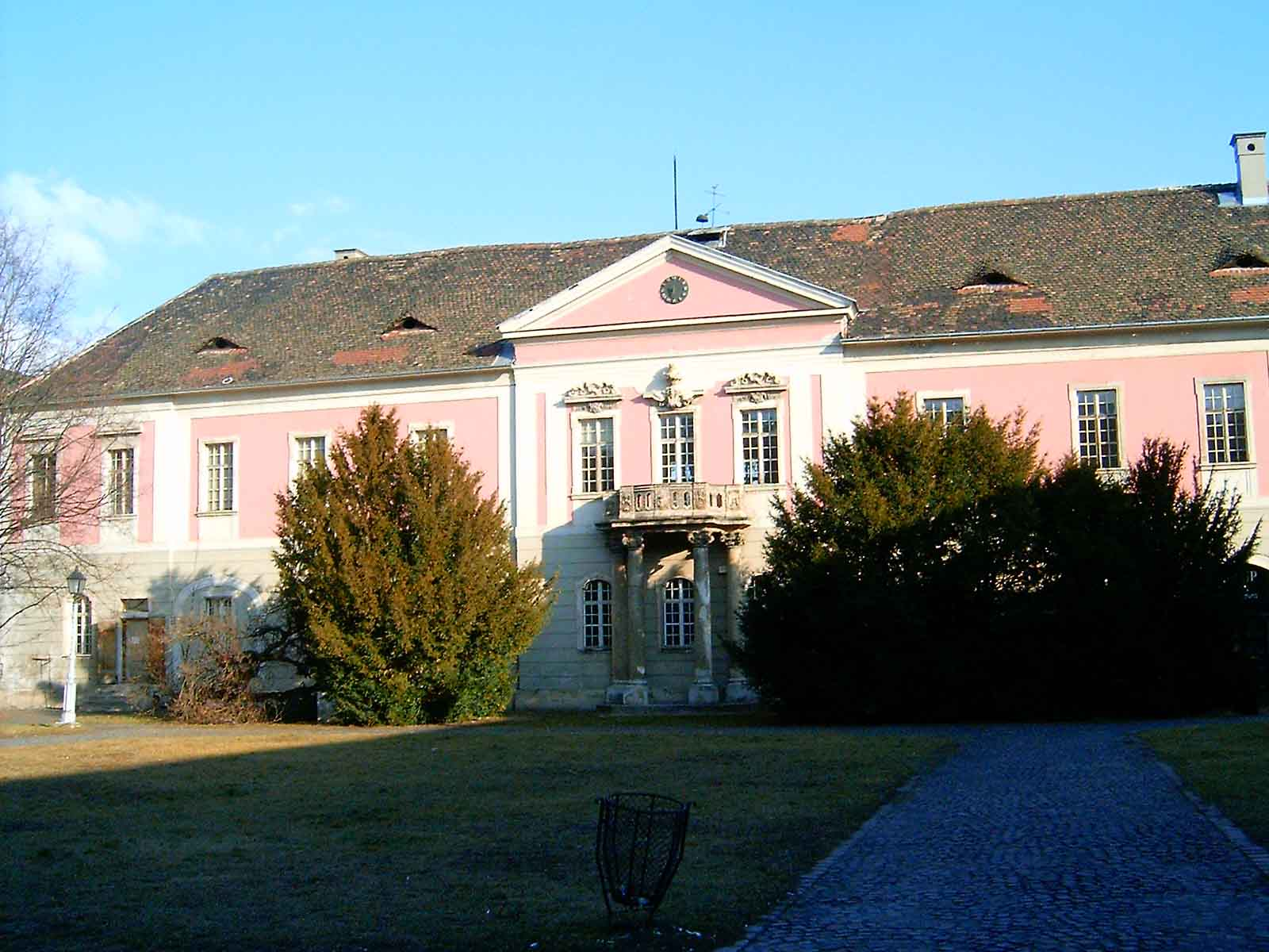 Zichy palota